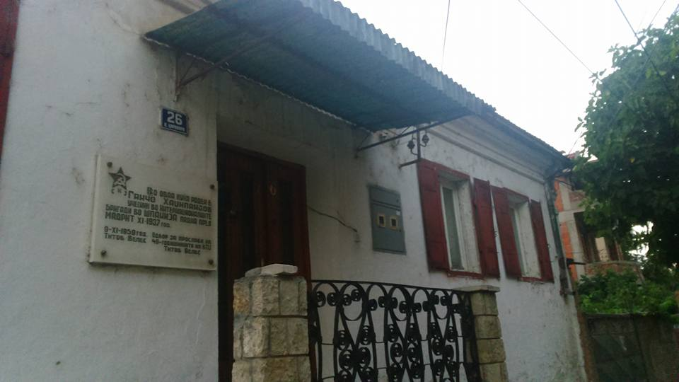 Родната куќа на Ганчо Хаџи Панзов во Велес